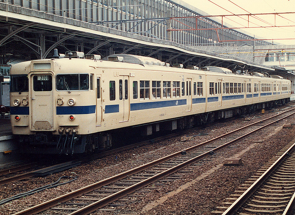 国鉄 クハ115-3101+モハ115-3001+モハ114-3001+クハ115-3001 広島色